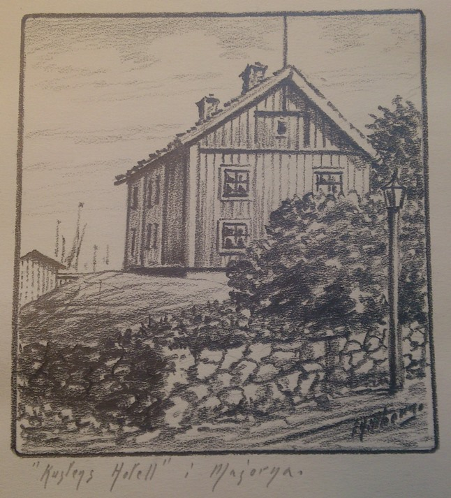 Kolteckning av Einar Hillberg föreställande Kustens hotell i Majorna Göteborg